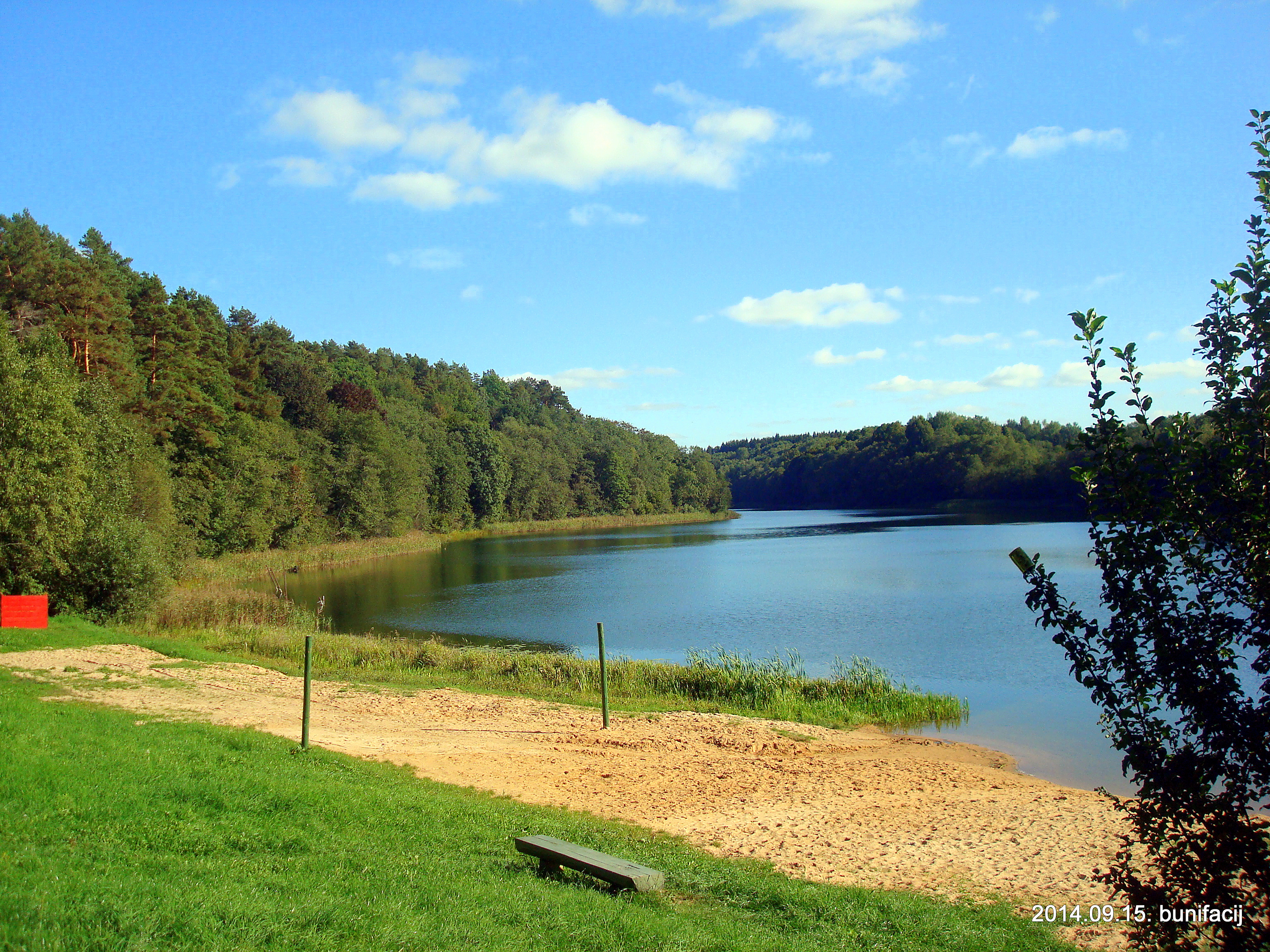 Пляж